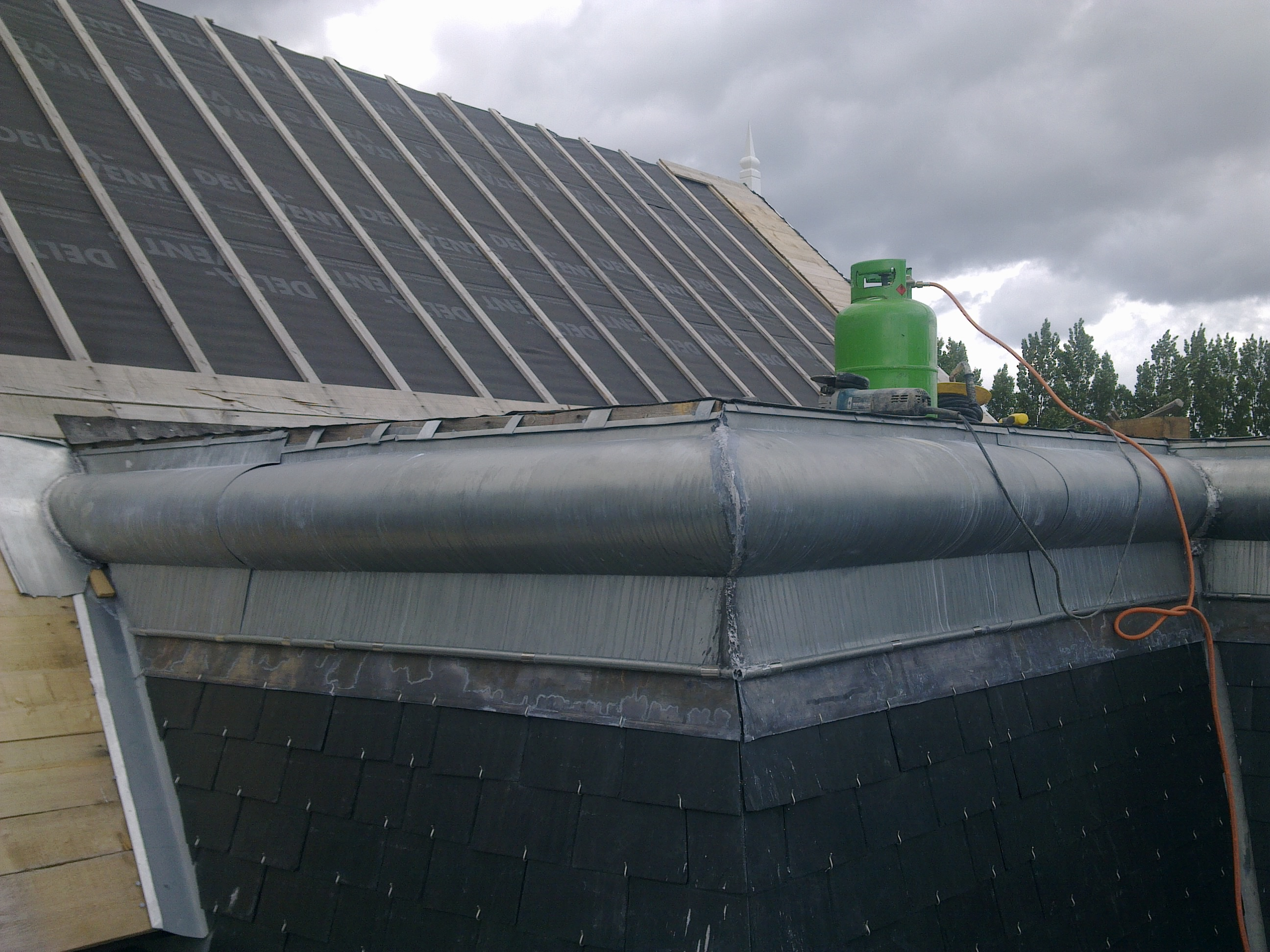 Création d'un brisis avec des membrons en zinc entre une toiture terrasse zinc et une couverture en ardoises d'Espagne